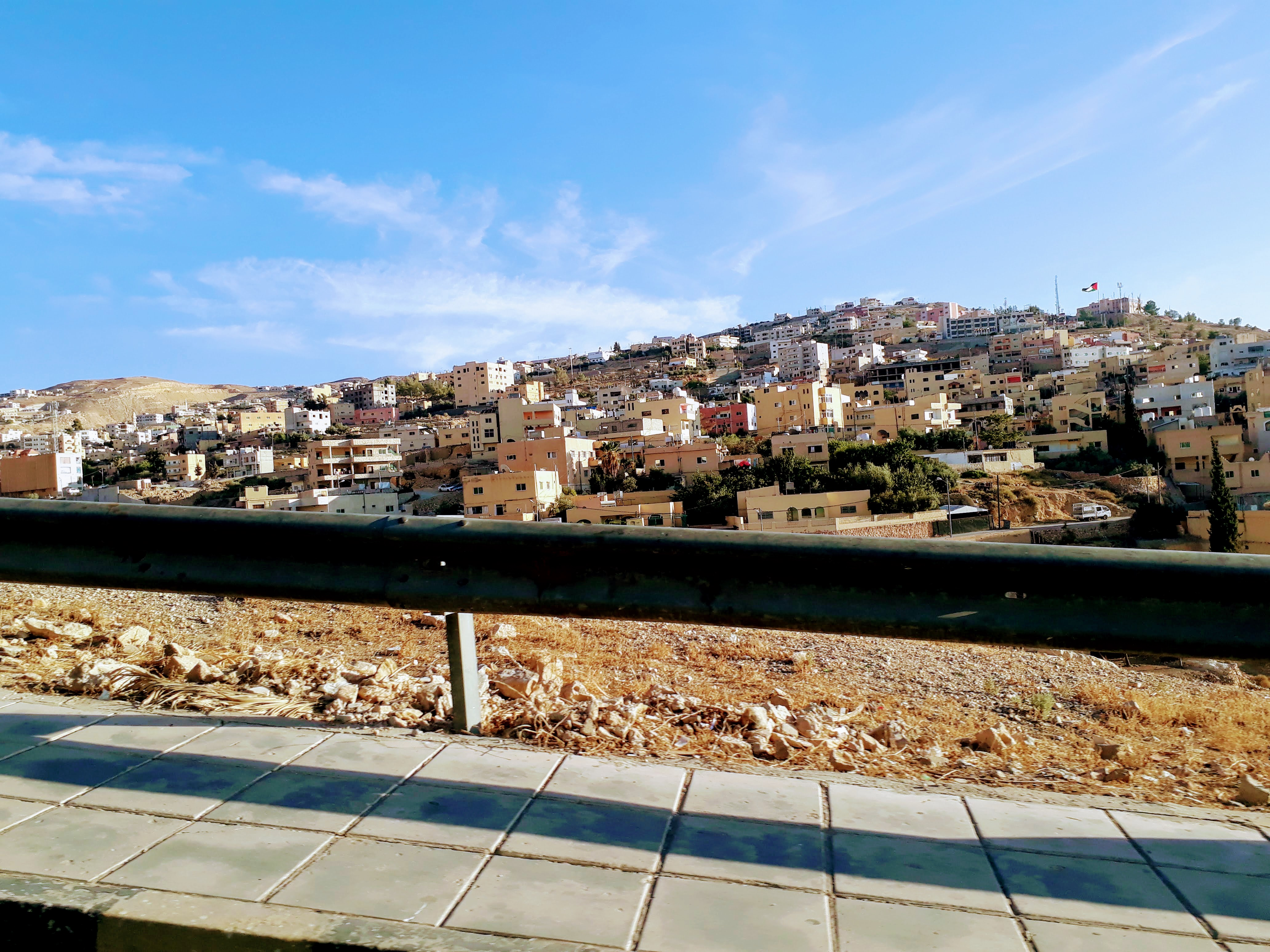 വാഡിമൂസ എന്ന ചെറുനഗരത്തിന്റെ ദൂരക്കാഴ്ച !